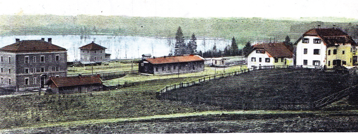 Blick auf den Bahnhof Geltendorf auf einer Ansichtskarte von 1902, in der Mitte das Empfangsgebäude, links das Eisenbahnerwohnhaus, dazwischen am Ufer das Wasserhaus, im Hintergrund der Emminger Weiher. 1916 wurde der Weiher trockengelegt, das fortan nicht mehr genutzte Wasserhaus wurde in den 1930er Jahren abgebrochen.